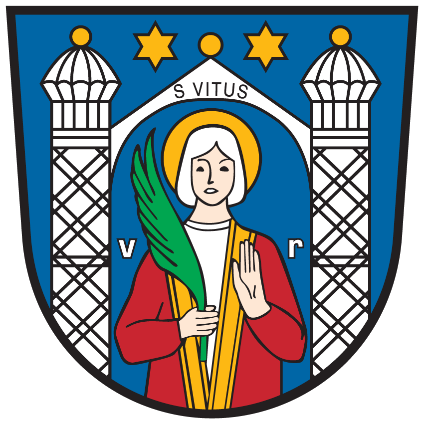 Wappen von St. Veit an der Glan